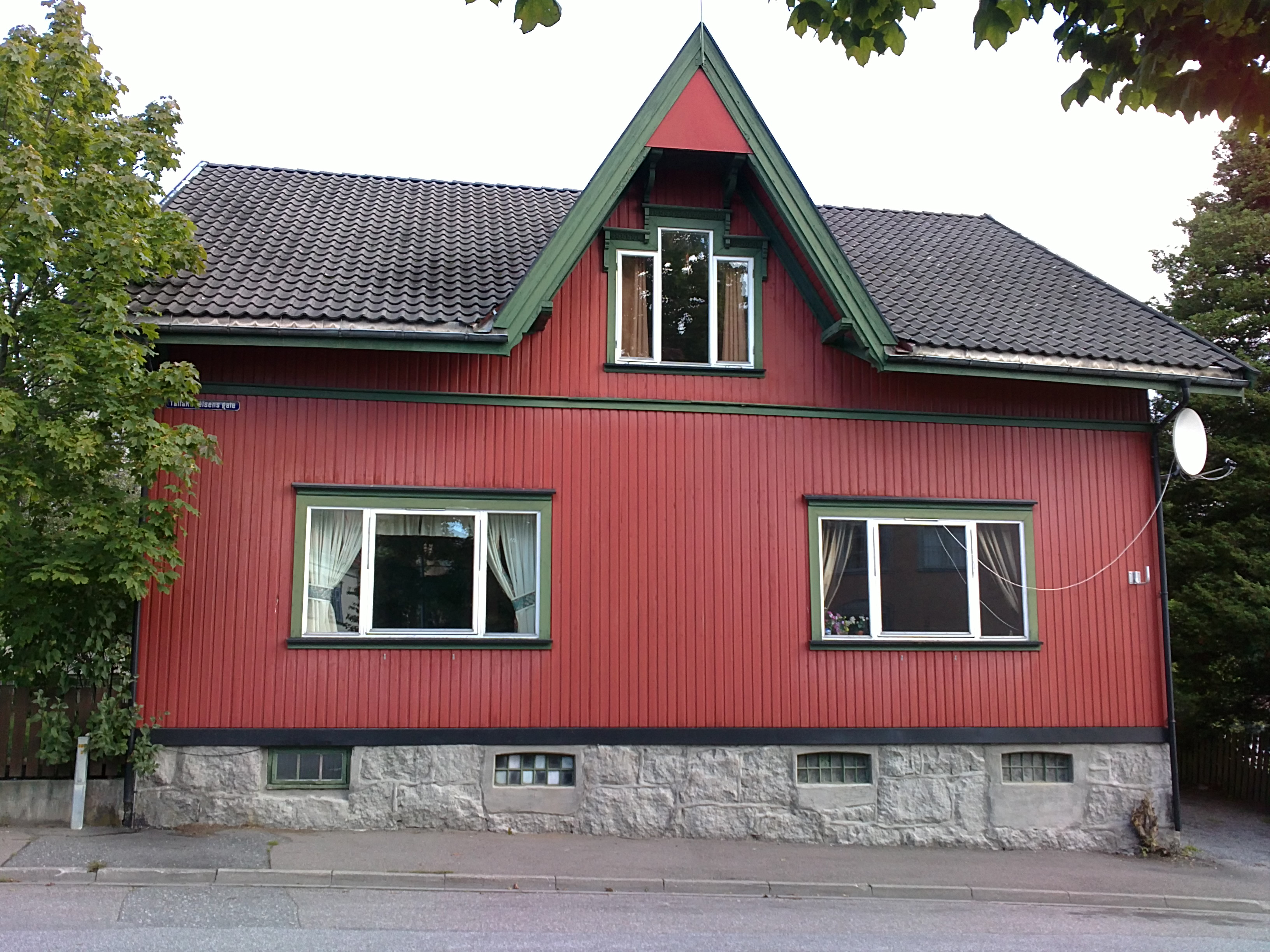 Bilde av Colin Archers gate 1